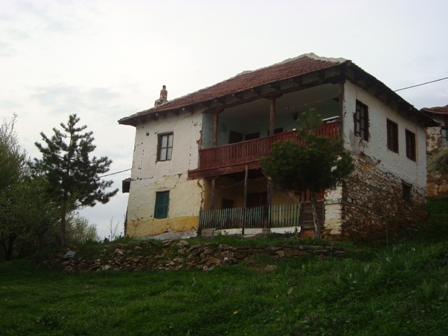 Селска_архитектура